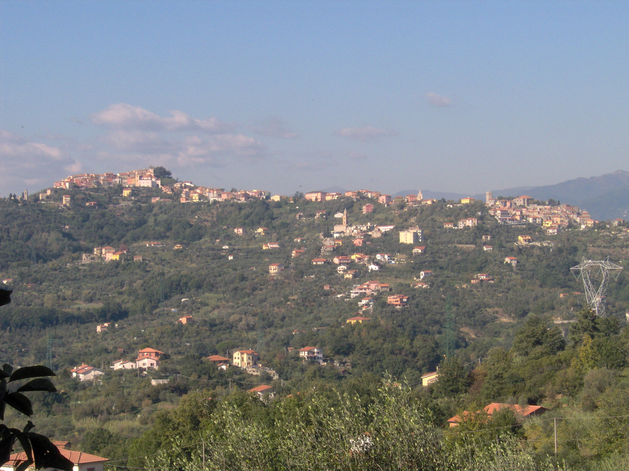 General view of Vezzano Ligure (province of La Spezia, Liguria, Italy)